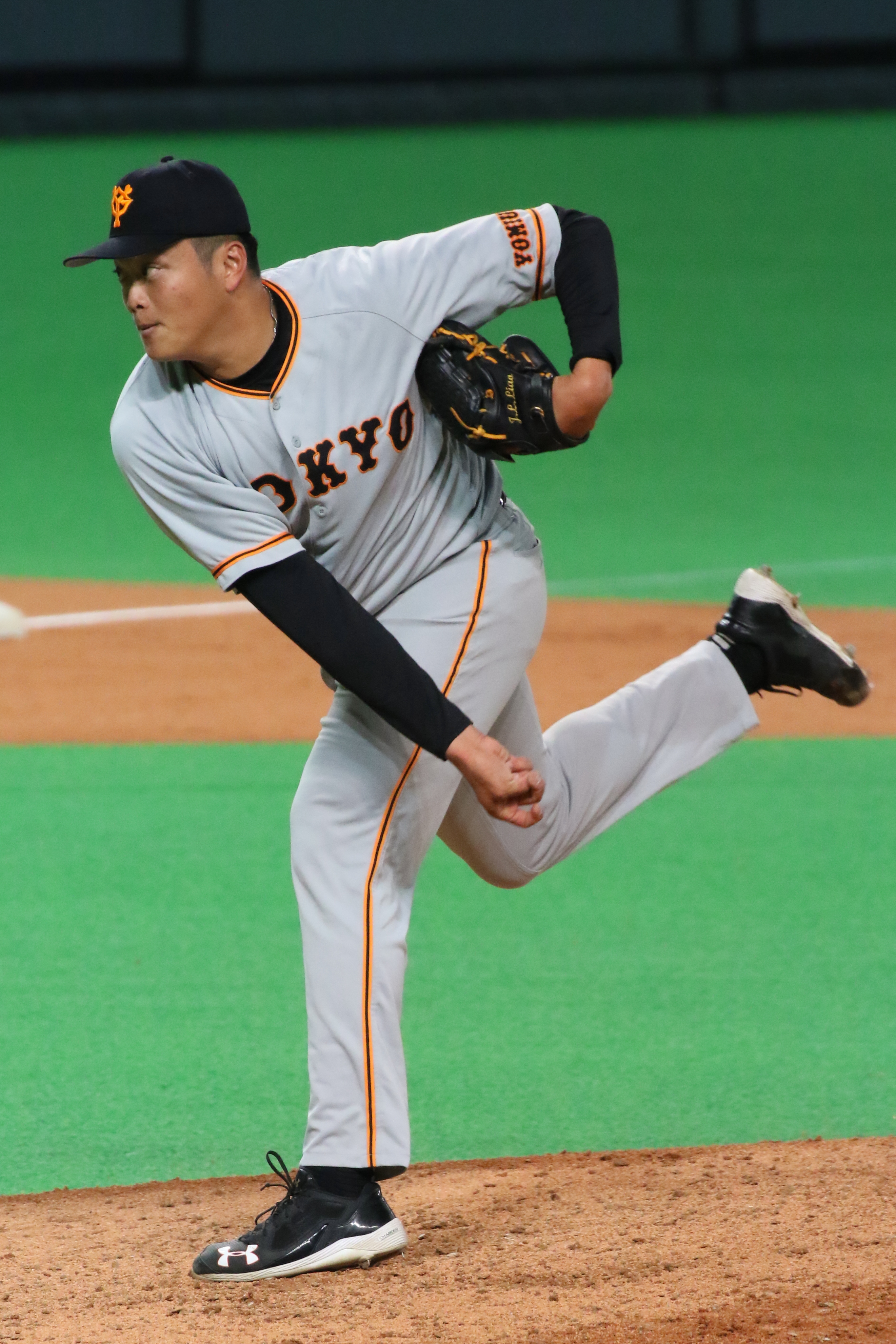 ジャイアンツリャオ投手